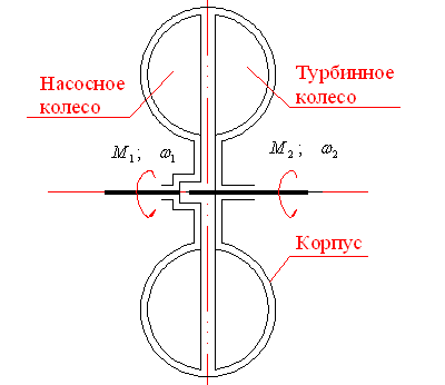 Гидромуфта